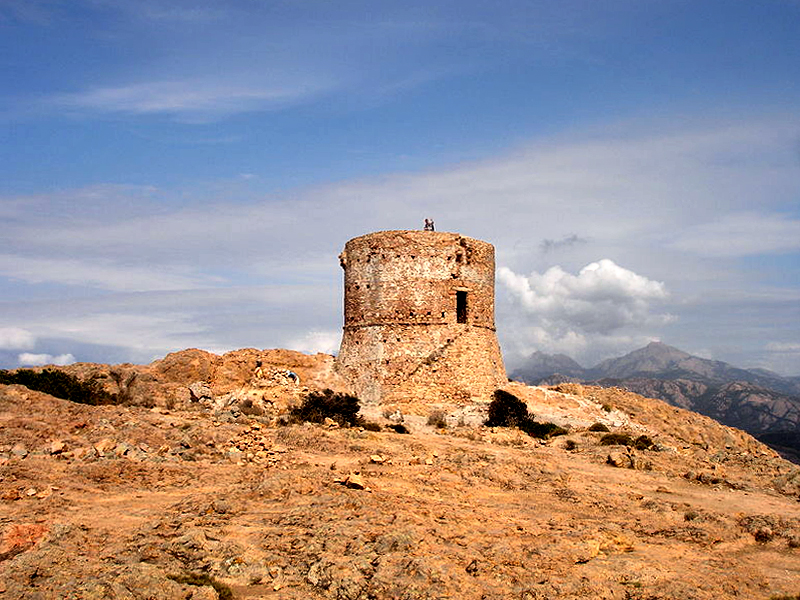 France, Corse-du-Sud (2A), Piana, Tour de Turghju, tour génoise de Capo Rosso